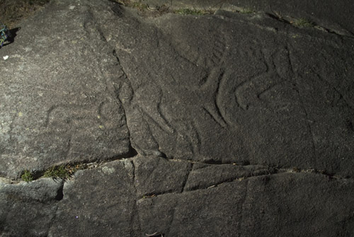 Petroglifos en Campo Lameiro, fotografados con luz artificial rasante.